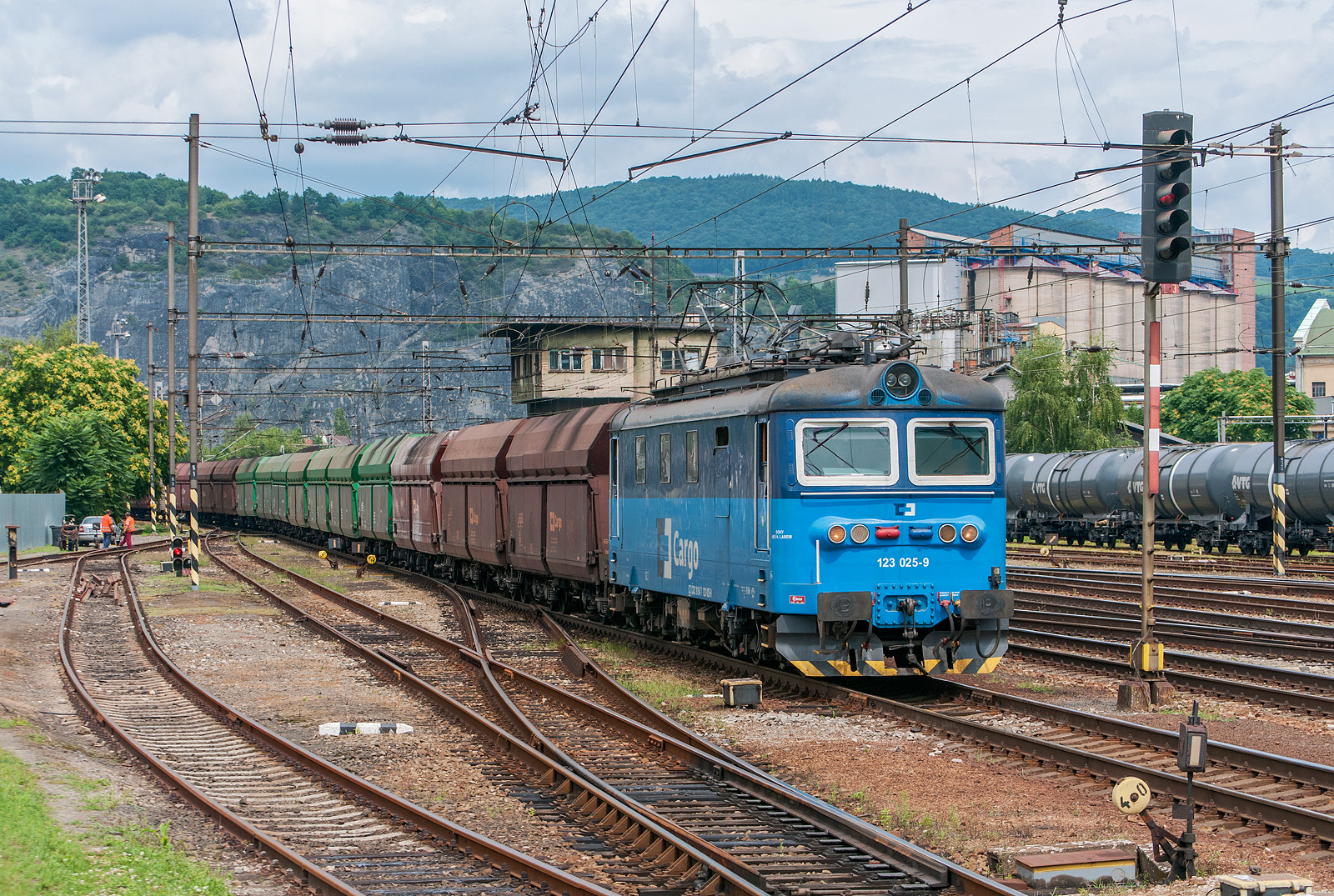 Elektrická lokomotiva 123.025 firmy ČD Cargo projíždí stanicí Ústí nad Labem-Střekov v čele uhelného vlaku do elektrárny Opatovice.